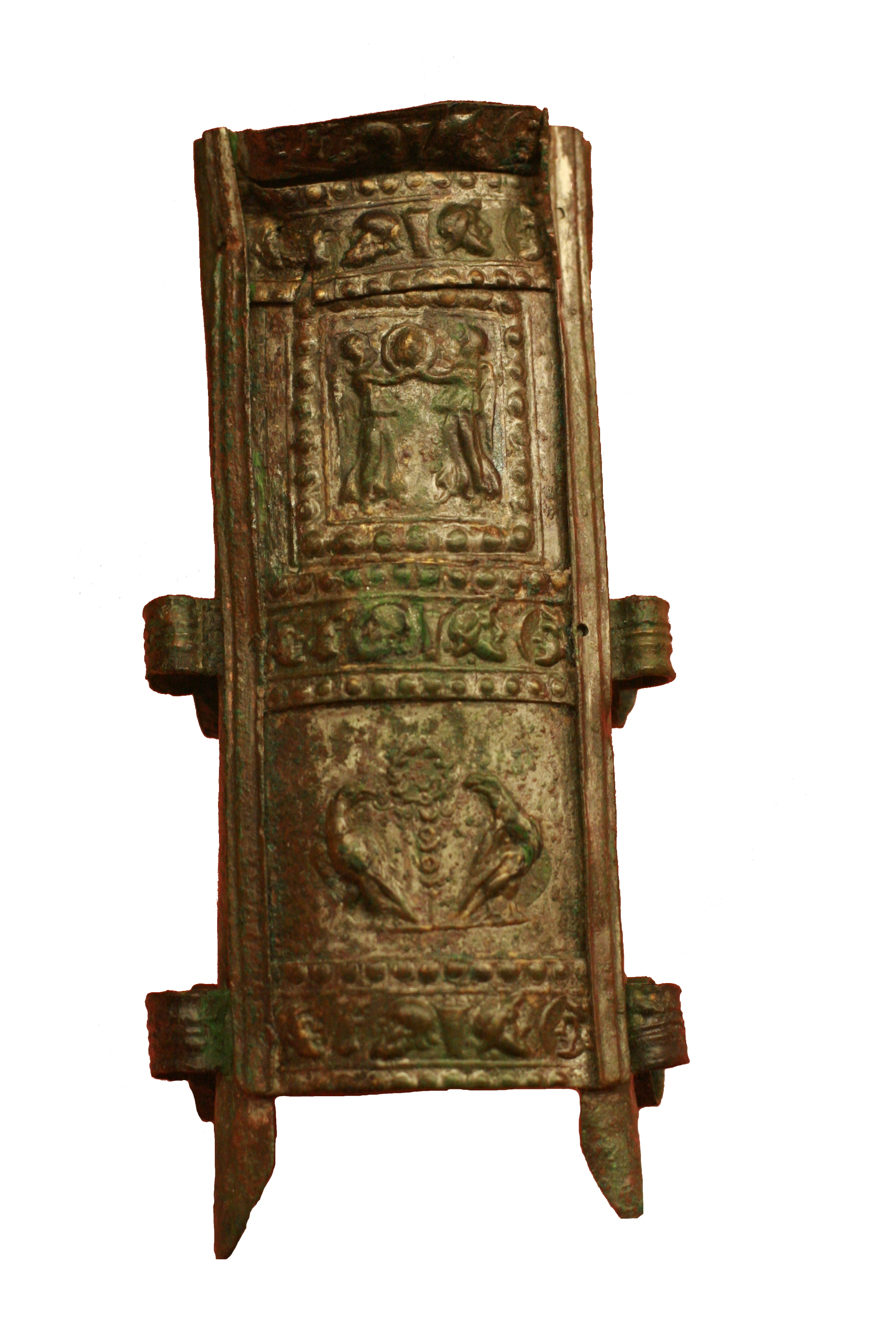 Mundblech einer Schwertscheide eines Gladius. Type Pmpeji, Untertyp Pottau. Museum Carnuntum